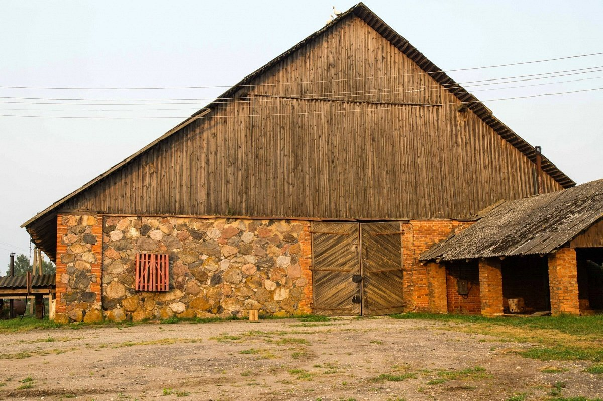 Канстанцінава. Гаспадарчая пабудова